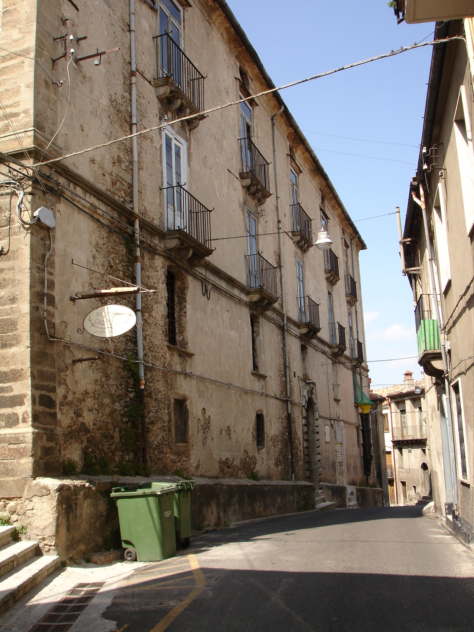 San Giovanni in Fiore. Palazzo Lopez. Facciata